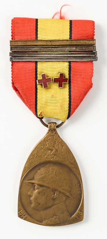 Alfons De Ceulaerde was de schoonvader van Johanna Van Dingenen. Alfons ging nog vele jaren met zijn schoondochter en zijn zoon naar de herdenkingen in Brussel. Alfons was soldaat gedurende vier jaar. Hij was in zijn laatste maand legerdienst bij het begin van de oorlog in 1914. Alfons mocht dus niet afzwaaien. Hij werd getroffen door een kogel in de buik. Alfons werd overgebracht naar Brighton. Van zodra hij genzezen was moest hij terug naar het front. Zijn vrouw kwam hem opzoeken met hun kind dat toen één jaar was. Zijn vrouw sprak geen Engels. Met dit bezoek waren de ouders niet akkoord maar zij is toch gegaan omdat haar zuster haar wou vergezellen. Toen zij in Engeland waren moesten ze blijven tot de oorlog voorbij was. Alfons vertelde veel over de oorlog; over gevechten van man tegen man, enz.. Hij was een kleine man en was heel fier op zijn prestaties. Alfons stond bij de Brabançonne steeds fier recht. Hij werd bevangen door gas aan het front en moest hierdoor altijd heel zwaar hoesten.